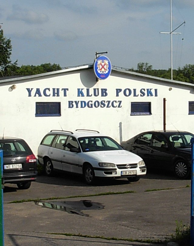 Siedziba żeglarskiego Yacht Klubu Polskiego w Bydgoszczy przy torze regatowym w Brdyujściu